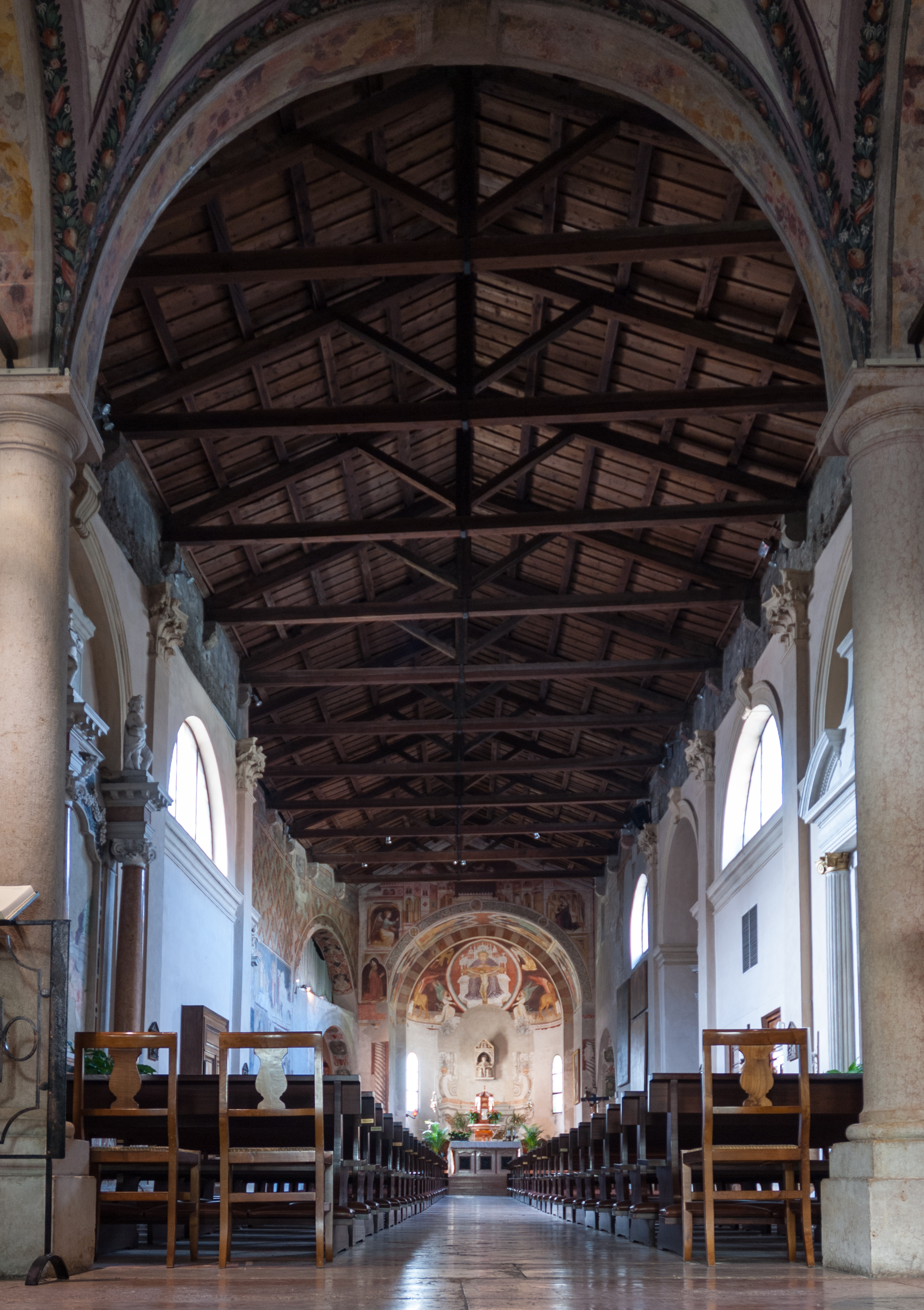 Chiesa della Santissima Trinità a Verona, dentro